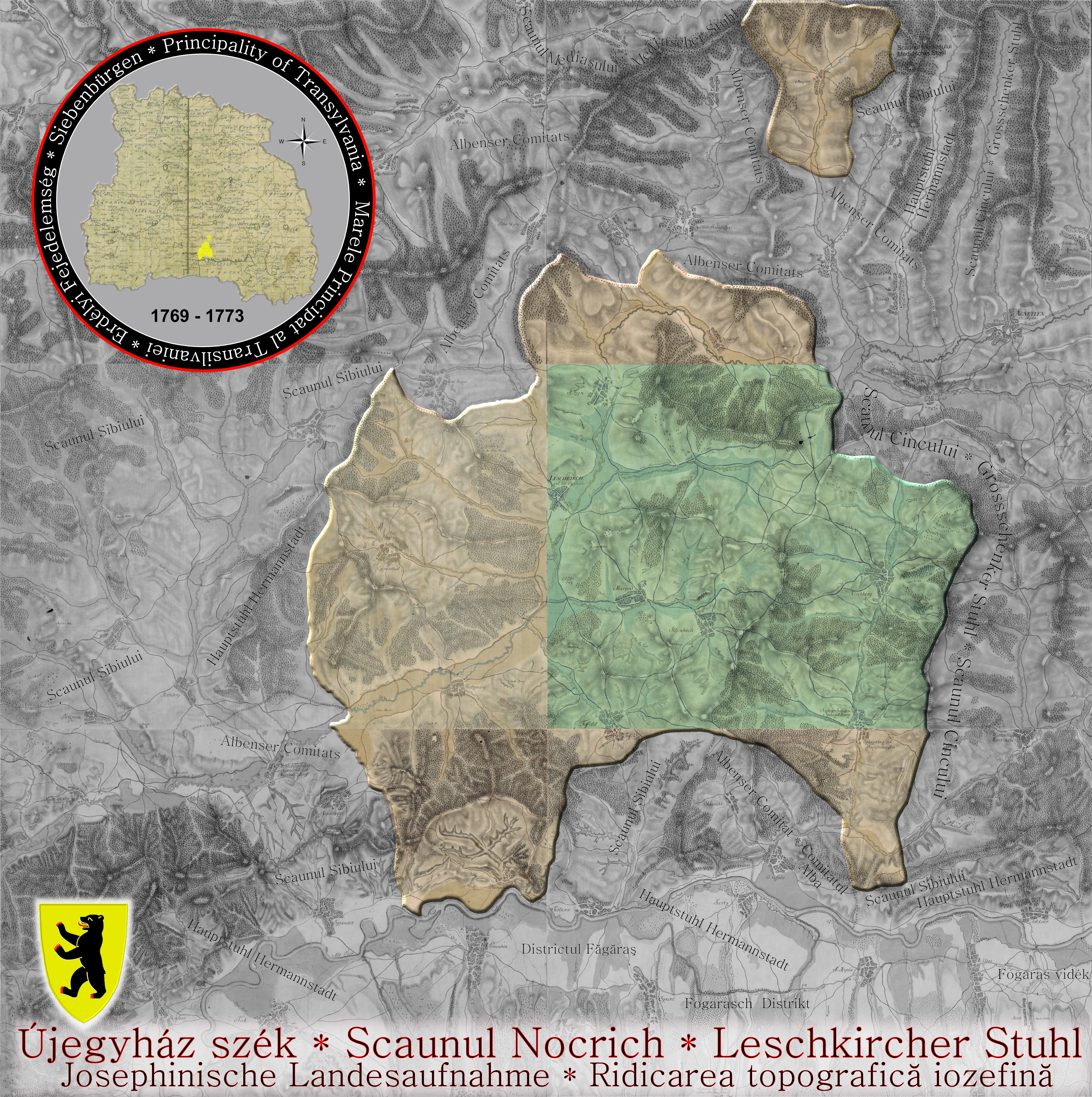 Scaunul Nocrich în Harta Iosefină a Transilvaniei, 1769 - 1773. Harta a fost creată prin concatenarea planşelor iozefine nr. 205-206, 221-222 şi 238-239.